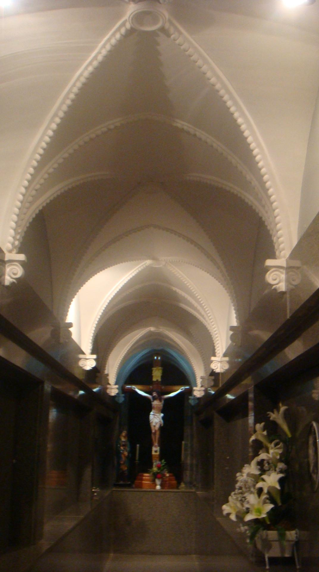 Mausoléu dos párocos da "Igreja de Bom Jesus Crucificado e do Imaculado Coração de Maria", em Bom Jesus do Itabapoana, no estado do Rio de Janeiro, no Brasil. Pertencente à Administração Apostólica Pessoal São João Maria Vianney.